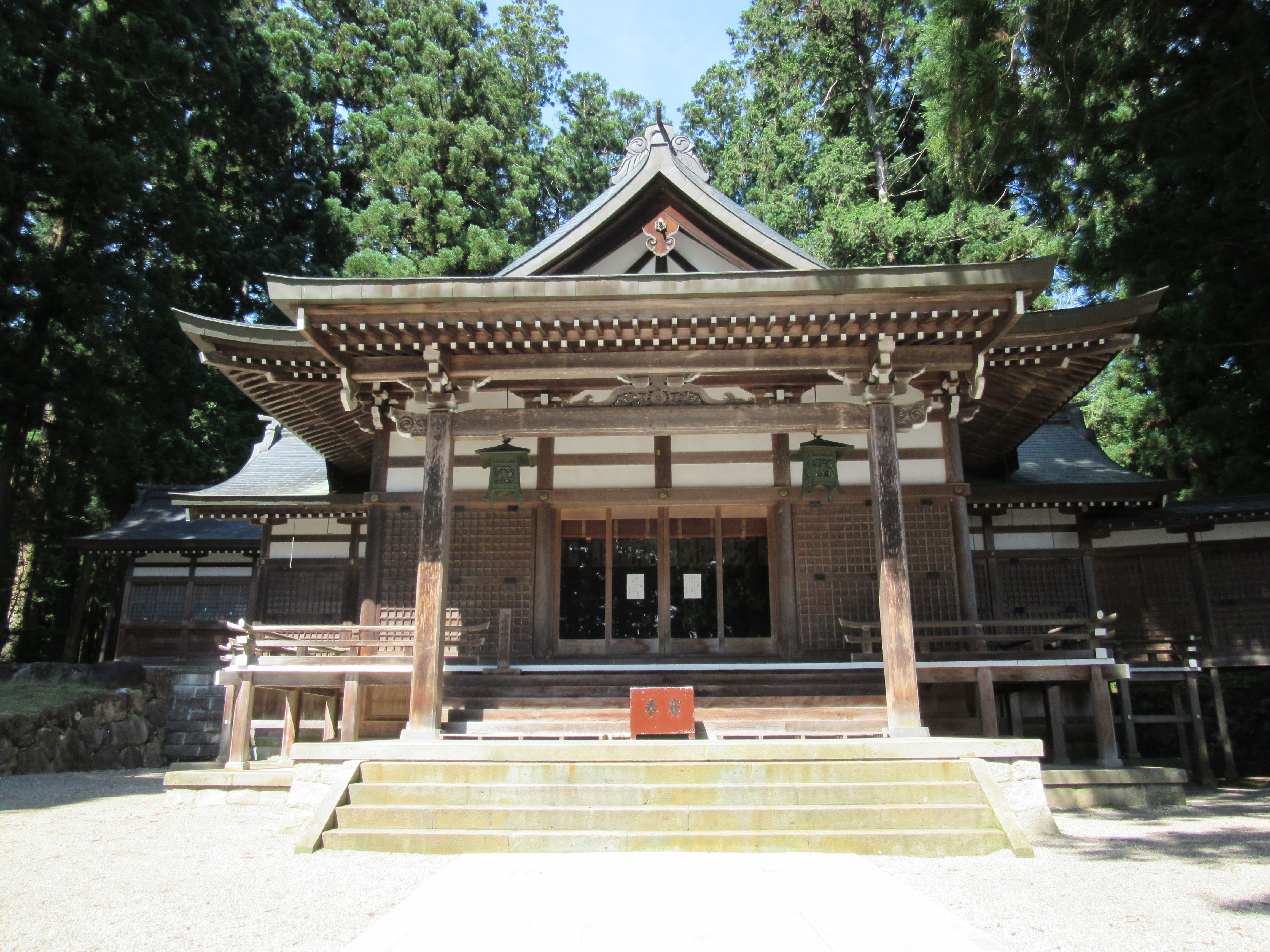 岐阜県飛騨市の気多若宮神社。